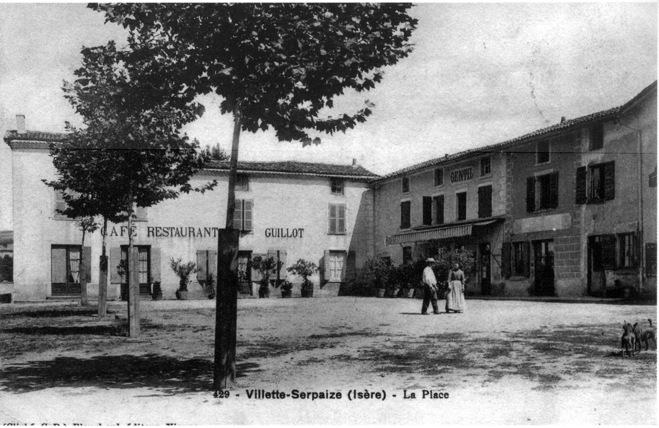 Villette-de-Vienne, la place, en 1907